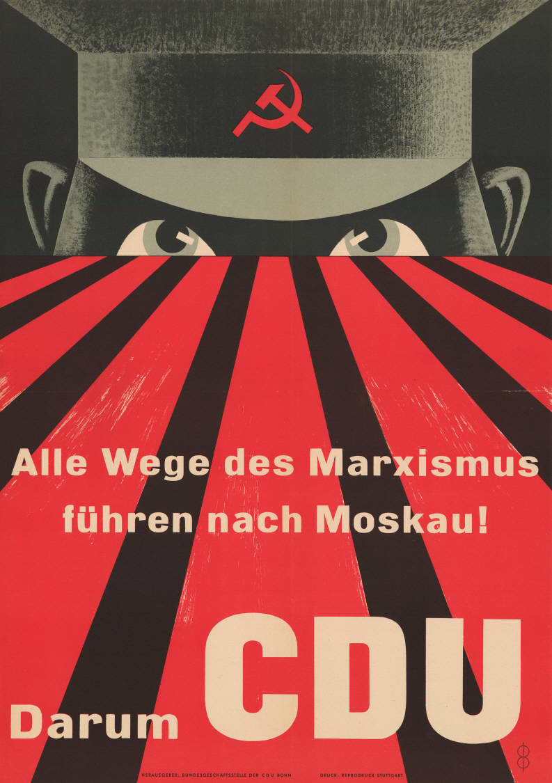 Alle Wege des Marxismus führen nach Moskau! Darum CDUAbbildung:RotarmistKommentar:Kalter KriegPlakatart:Motiv-/TextplakatKünstler_Grafiker:Signet unbekannt, vgl. Plakat Nr. 10-001-408Auftraggeber:CDU-Bundesgeschäftsstelle BonnDrucker_Druckart_Druckort:Reprodruck StuttgartObjekt-Signatur:10-001: 411Bestand:Plakate zu Bundestagswahlen (10-001)GliederungBestand10-18:Plakate zu Bundestagswahlen (10-001) » Die 2. Bundestagswahl am 6. September 1953 » MotivplakateLizenz:KAS/ACDP 10-001: 411 CC-BY-SA 3.0 DE